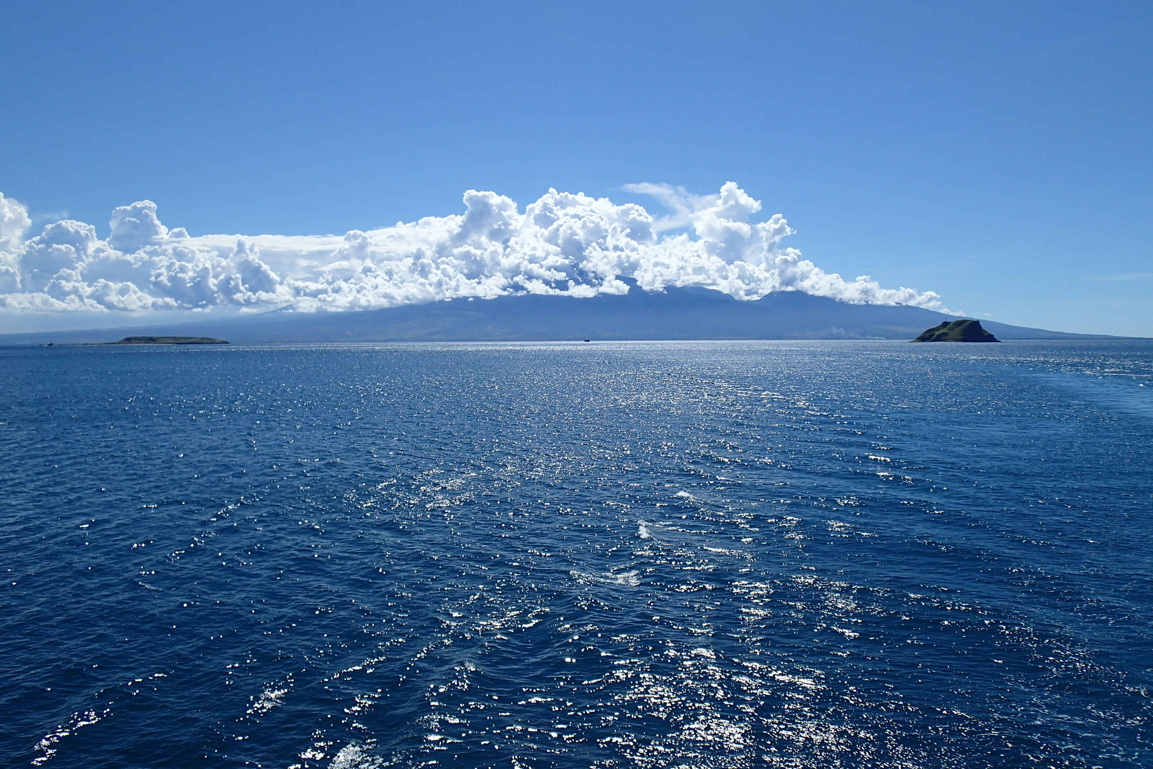 Ketika kapal feri berlayar meninggalkan Pulau Lombok menuju Pulau Sumbawa, maka di arah barat terlihatlah Puncak Rinjani yang tertutup awan diatas birunya Selat Alas. Pelayaran feri ini menempuh jarak sejauh 21,5 km.